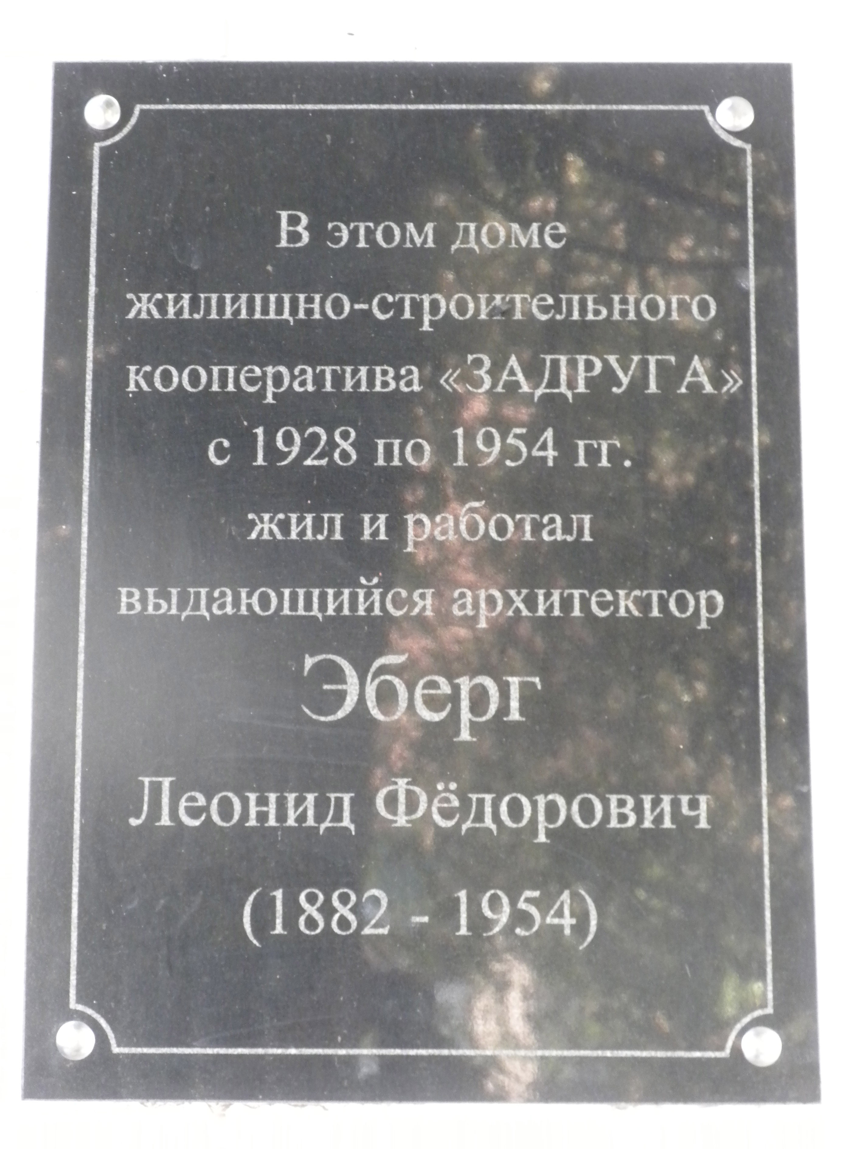 Памятная доска Леониду Эбергу в Ростове-на-Дону, ул. Серафимовича 76